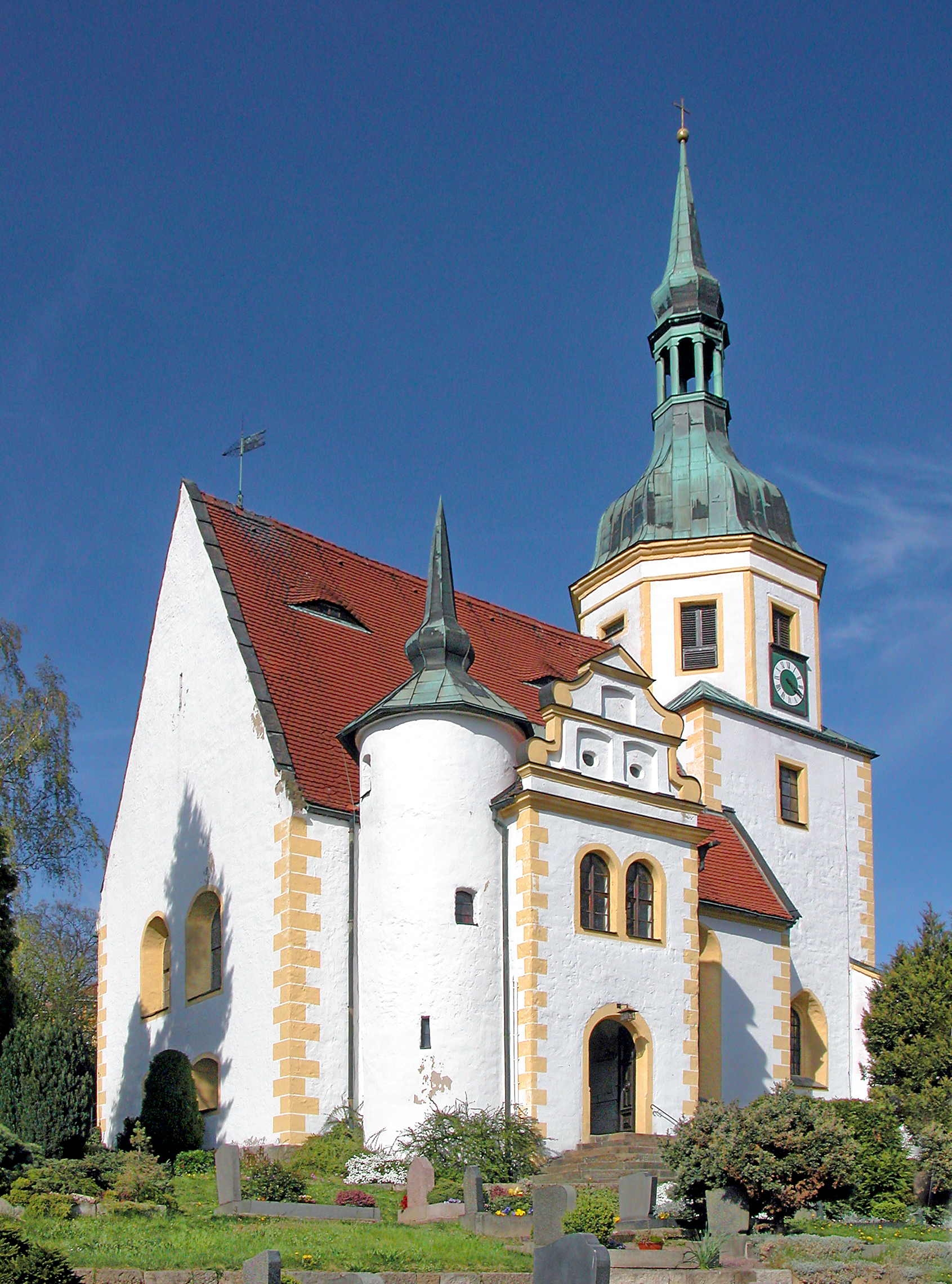 21.04.2007 01796 Struppen: Evangelische Kirche KleinStruppen, Kirchberg. Ersterwähnung Struppens war 1275, da stand die vom Deutschritterorden erbaute romanische Kirche schon. Heutige Kirche von 1740. [DSCN22081.TIF]20070421365.JPG(c)Blobelt